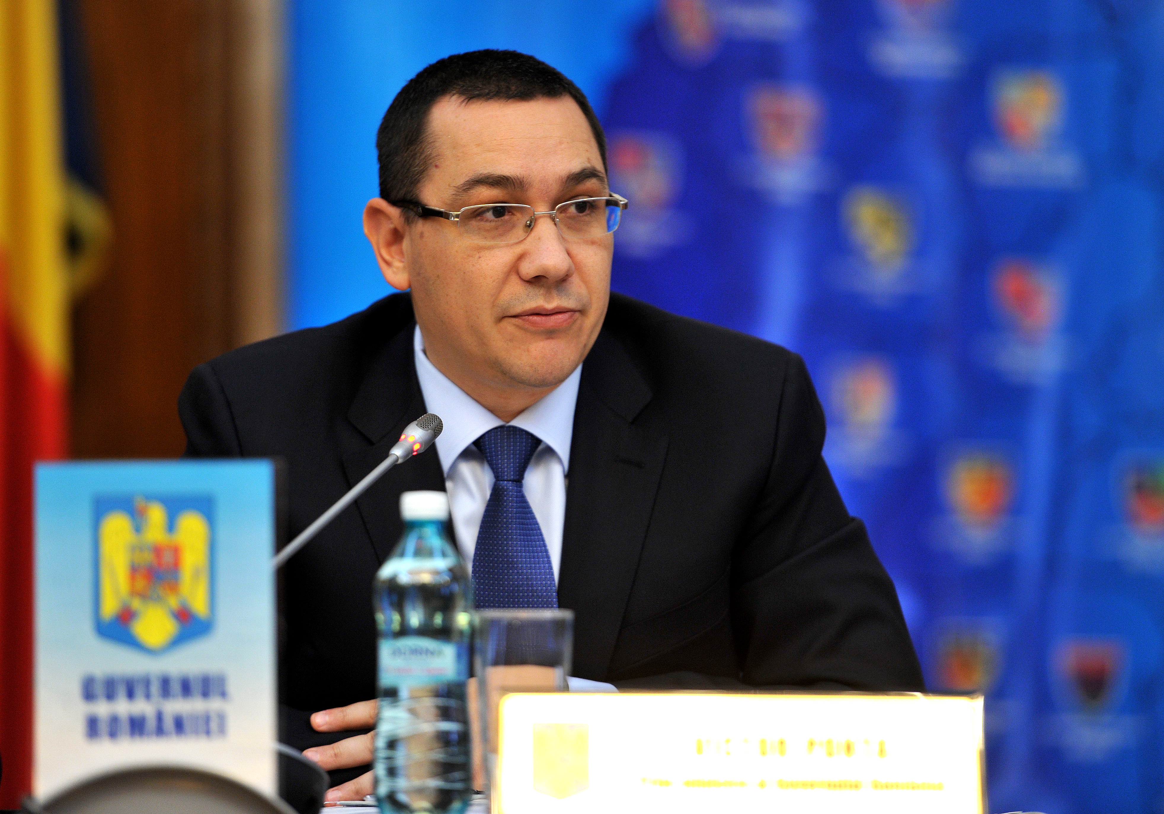 Victor Ponta la Adunarea Generala a UNCJR, Palatul Parlamentului - 03.12.2013